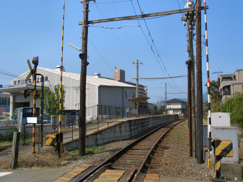 熊本電気鉄道坪井川公園駅 奥が上熊本駅方面、手前が北熊本駅方面。 撮影者/著者/著作権保有者 : MK Products (本人がアップロード) 撮影日 : 2006/09/24 坪井川公園駅用にアップロードした画像です。良い画像があれば別の画像に変えてください。